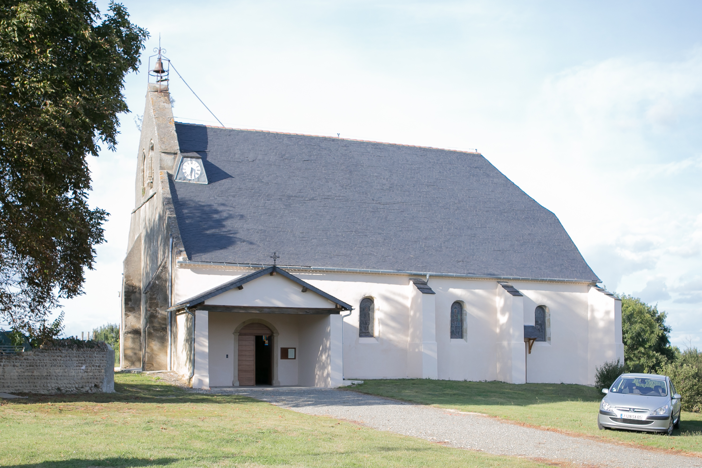 Église Saint-Pierre de Lahitte-Toupière / Hautes-Pyrénées , France